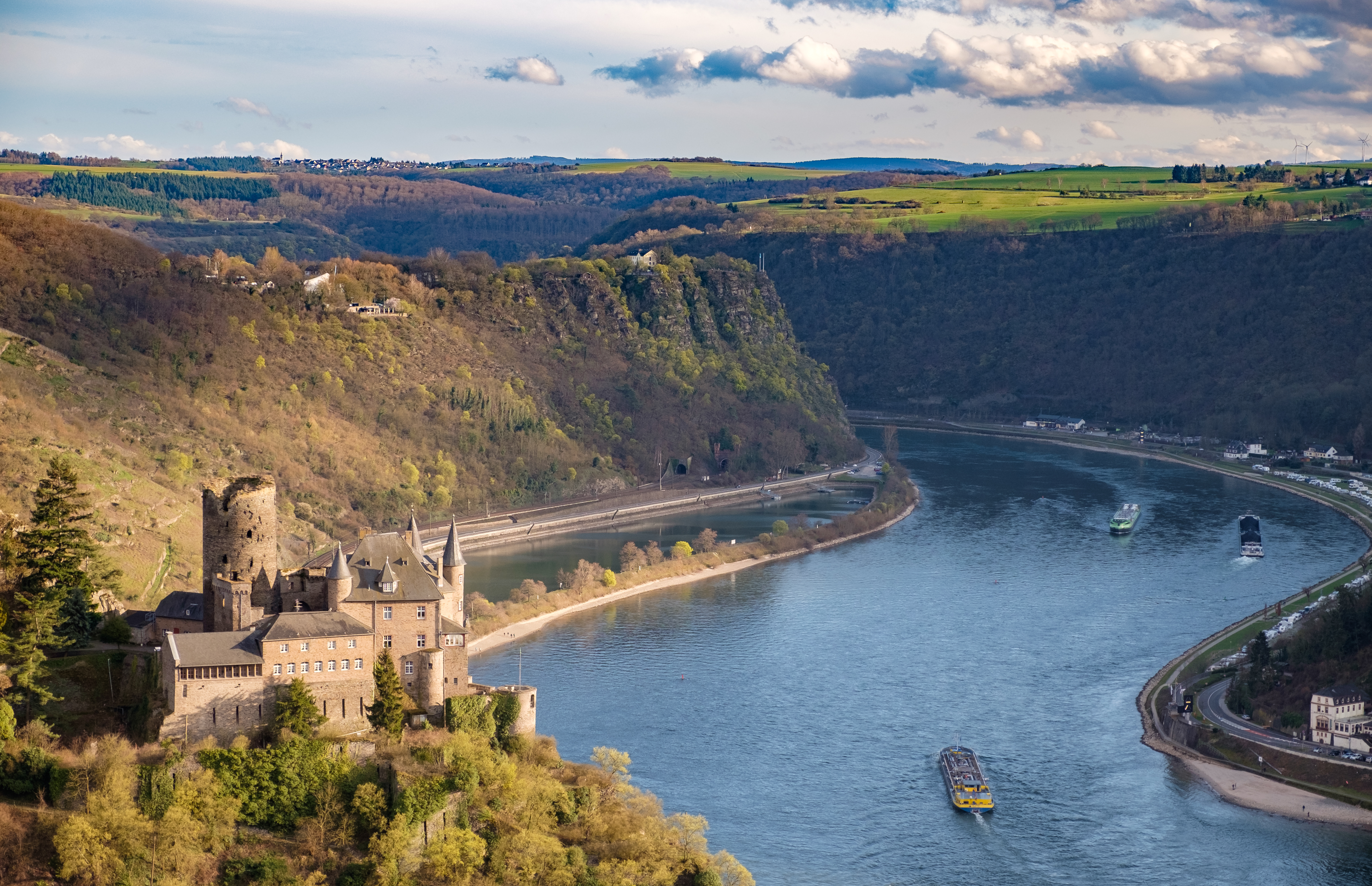 Burg Katz und Loreleyfelsen, von Dreiburgenblick bei Patersberg